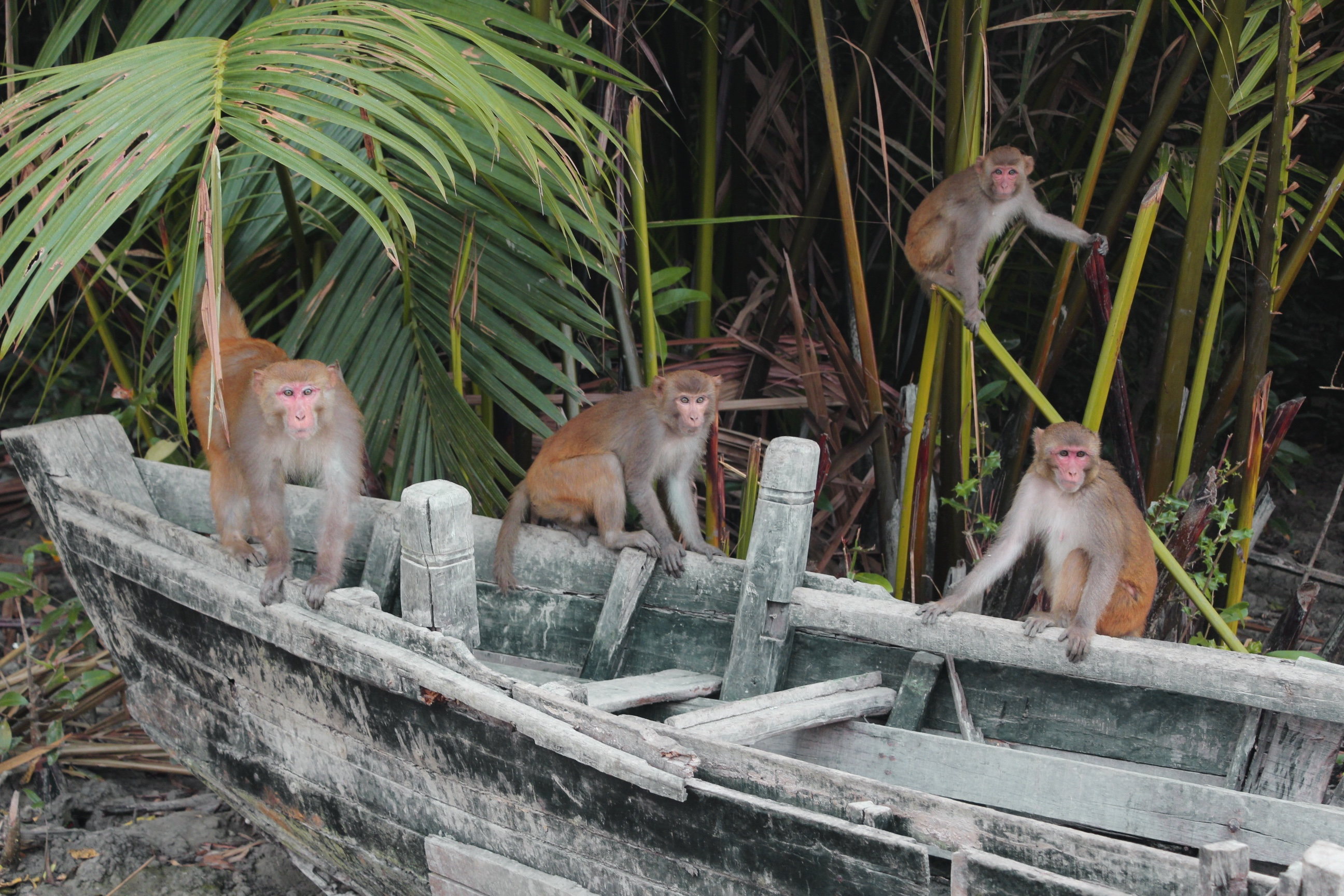 ঢাংমারী বন্যপ্রাণী অভয়ারণ্য